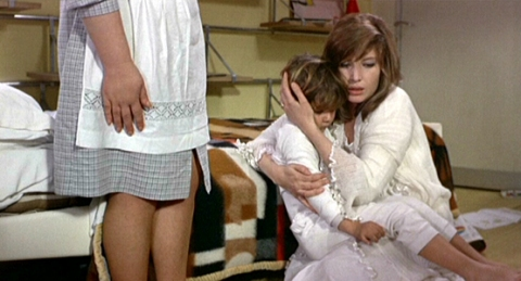 Valerio Bartoleschi és Monica Vitti a Vörös sivatag c. olasz-francia filmben, rendezte Michelangelo Antonioni, 1964